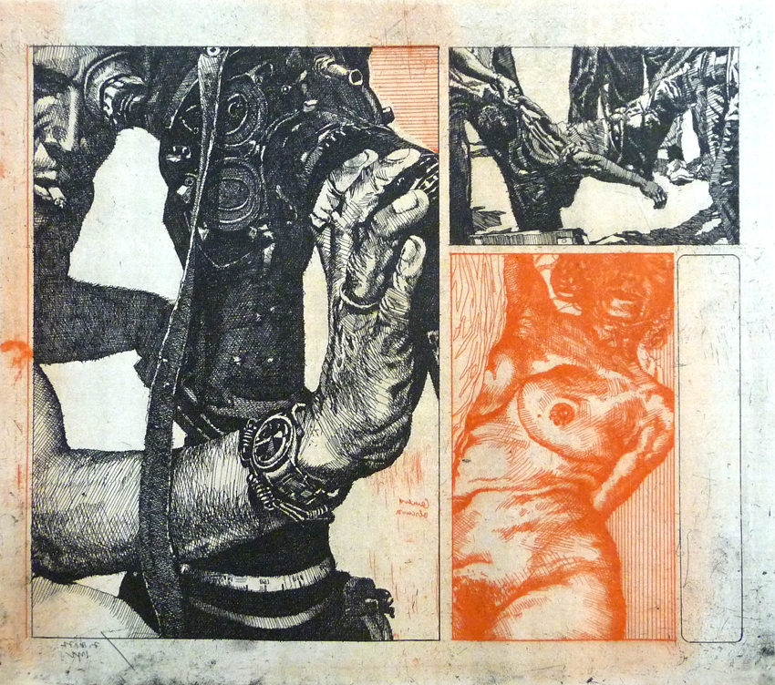 Peter Sorge, Camera Obscura, 1971, Farbradierung auf Kupferdruckbütten, Platte 34,7 x 39,5 cm, Blattmaß 53,5 x 68,7 cm, Auflage: 150, 30 e.a., von Sorge nummeriert, signiert und datiert